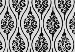 CG